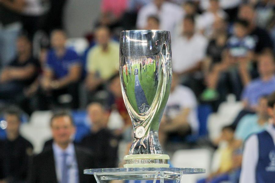 Перед матчем за Суперкубок УЄФА 2015 року у Тбілісі. Грузія